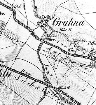 Original image description from the Deutsche Fotothek Dresden-Strehlen. Oberreit, Sect. Dresden, 1821/22